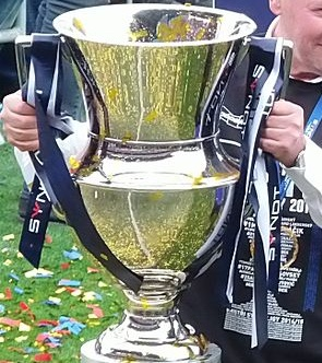 Trofej pro vítěze